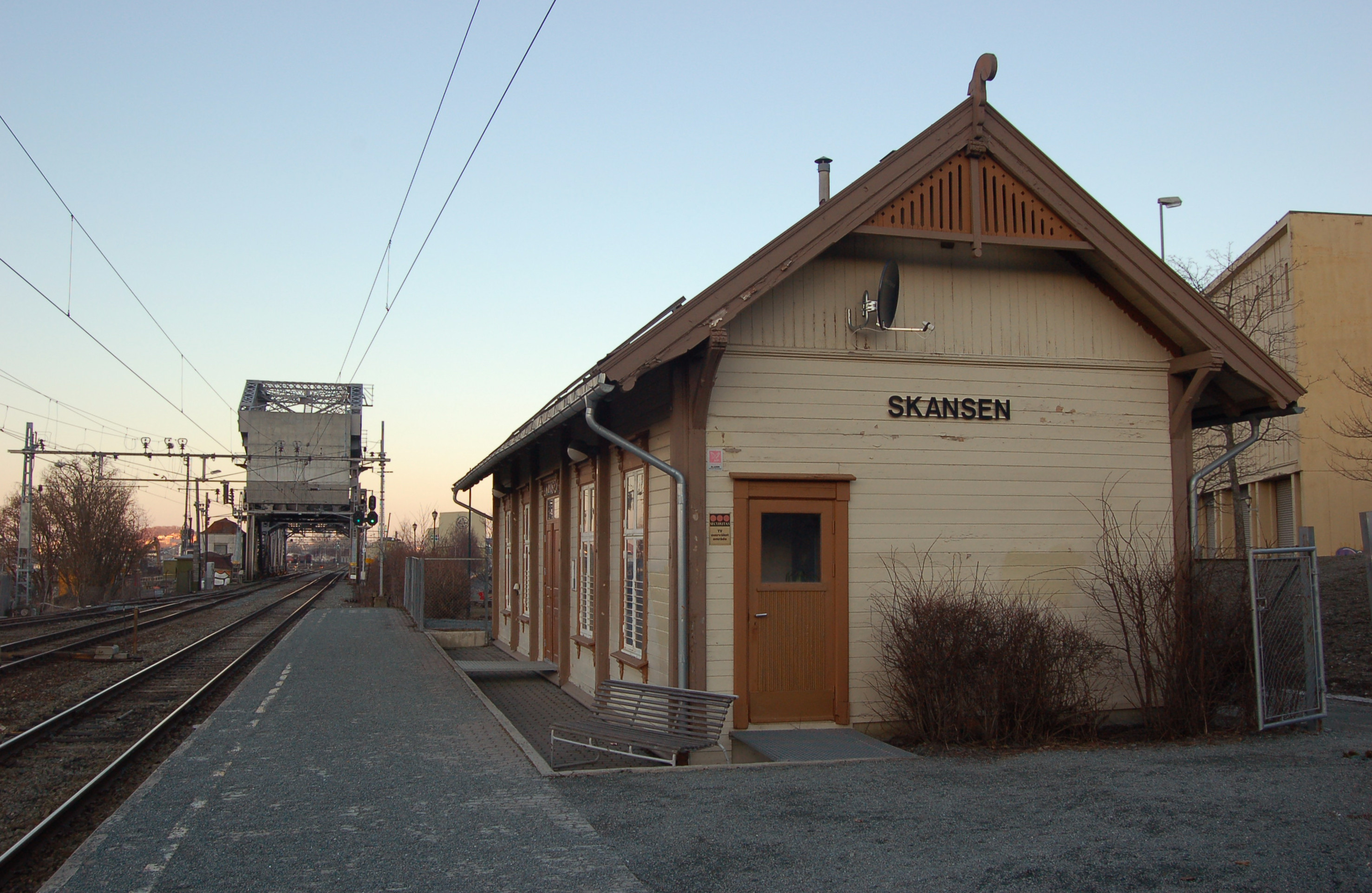 Skansen Station on Dovrebanen in Trondheim, Norway